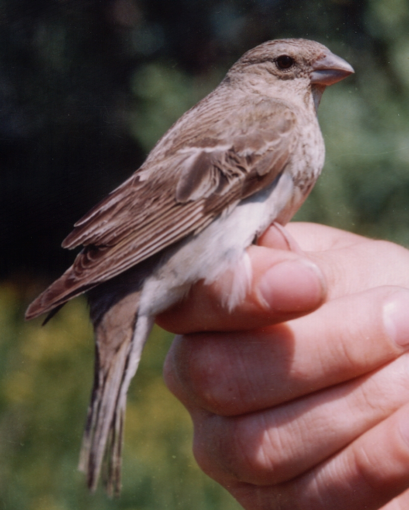 Karmazsinpirók öreg tojó (Fertőrákos)